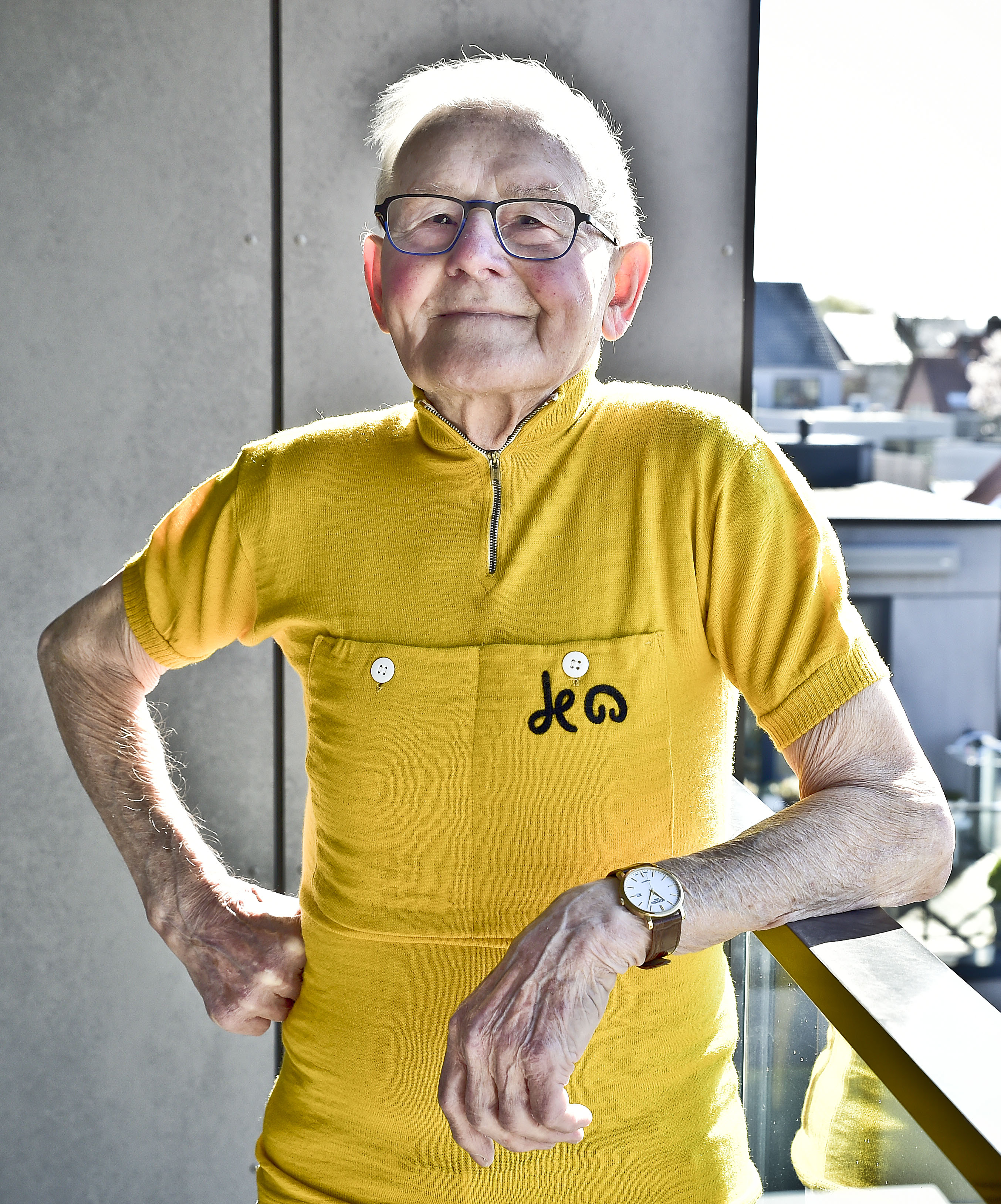 Gilbert Desmet poseert met zijn gele trui. Hij bevindt zich op het balkon van zijn appartement in Lichtervelde. De foto werd gemaakt in het kader van Etappe #07 dat in het teken stond van de Tour de France en de gele trui.